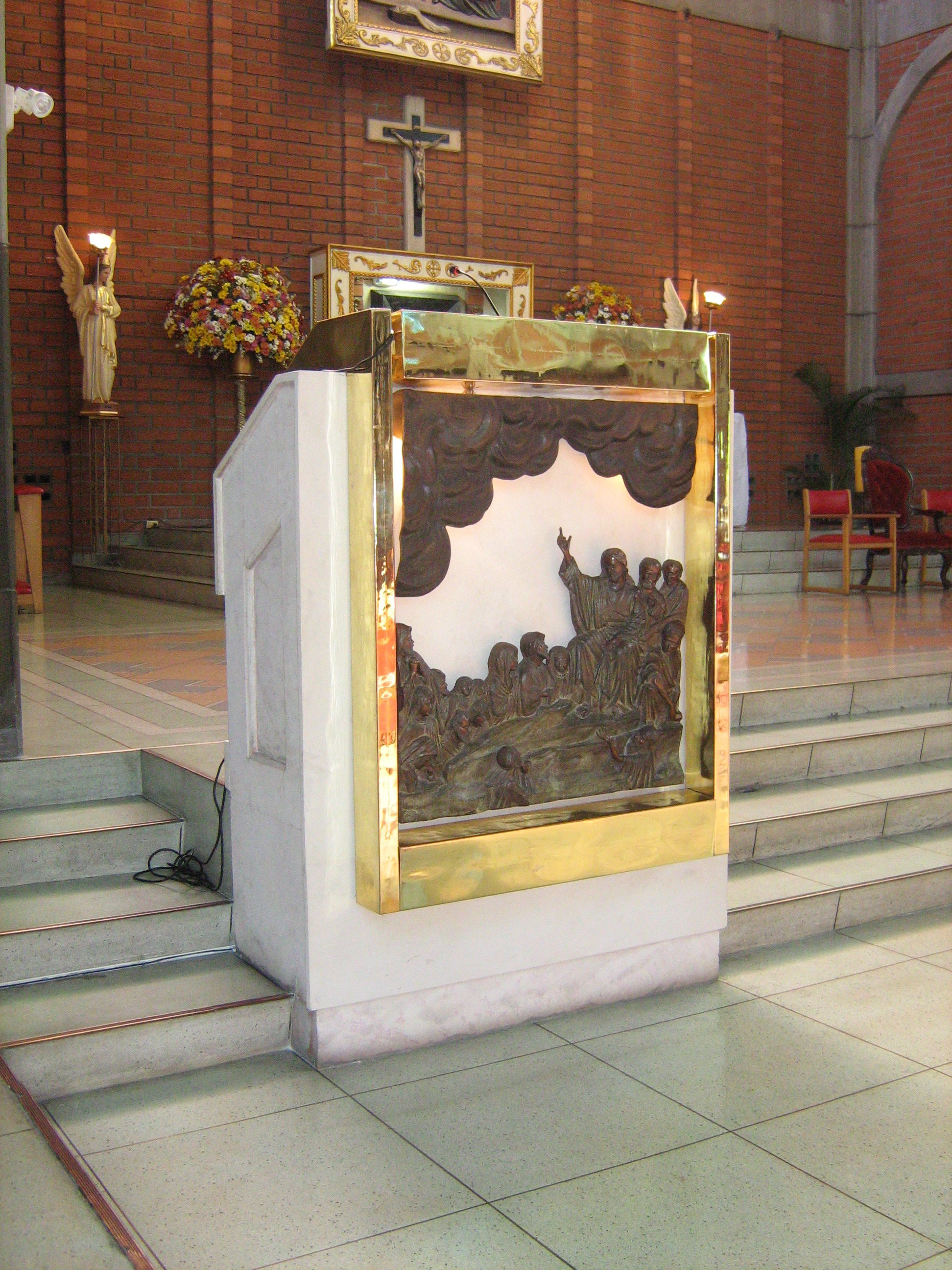 Iglesia de San Joaquín, Medellín, Colombia.